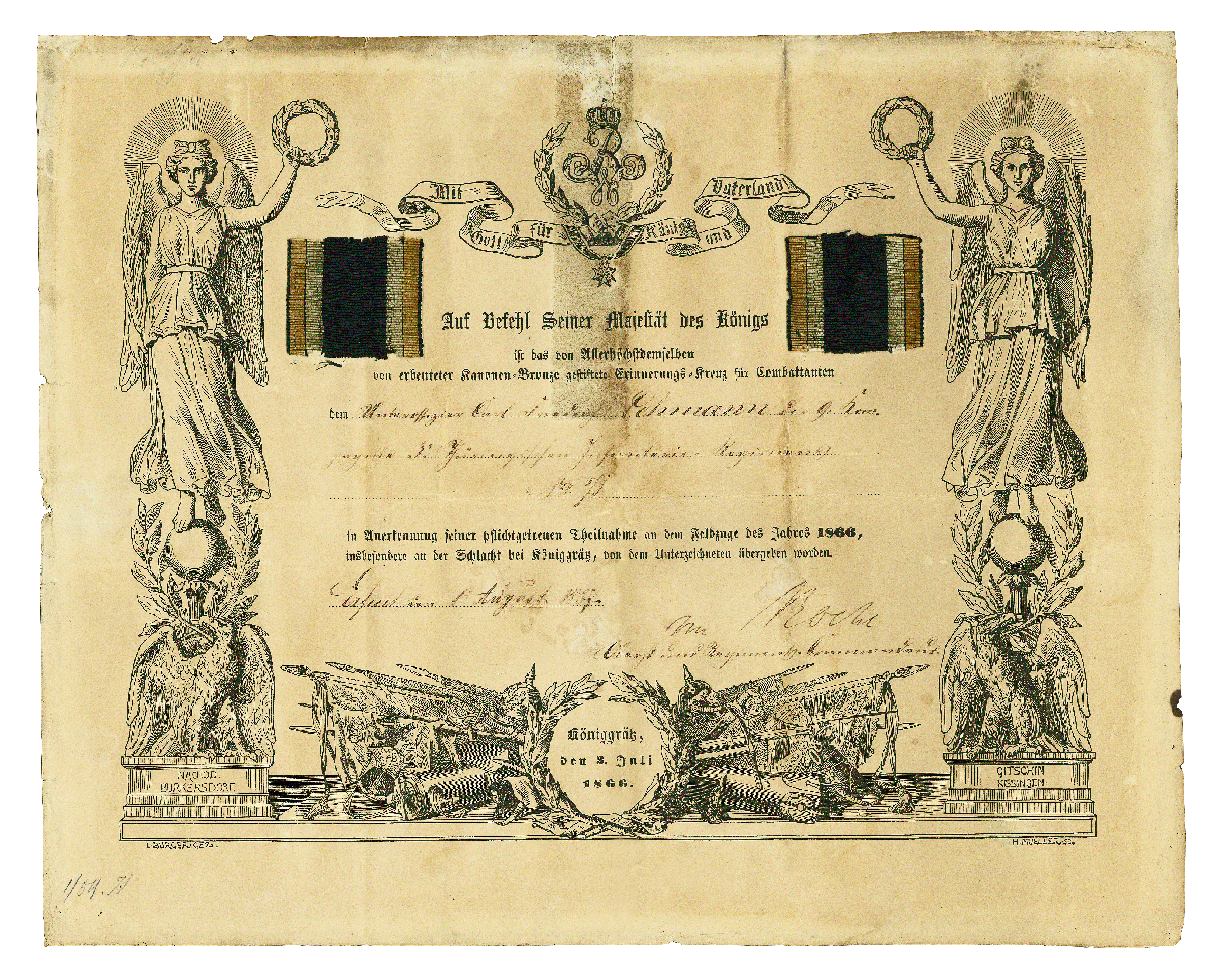 Preußische Verleihungsurkunde für das Erinnerungskreuz Königgrätz mit Inschrift: „GOTT WAR MIT UNS, IHM SEI DIE EHRE“ für das siegreiche preußische Heer 1866.